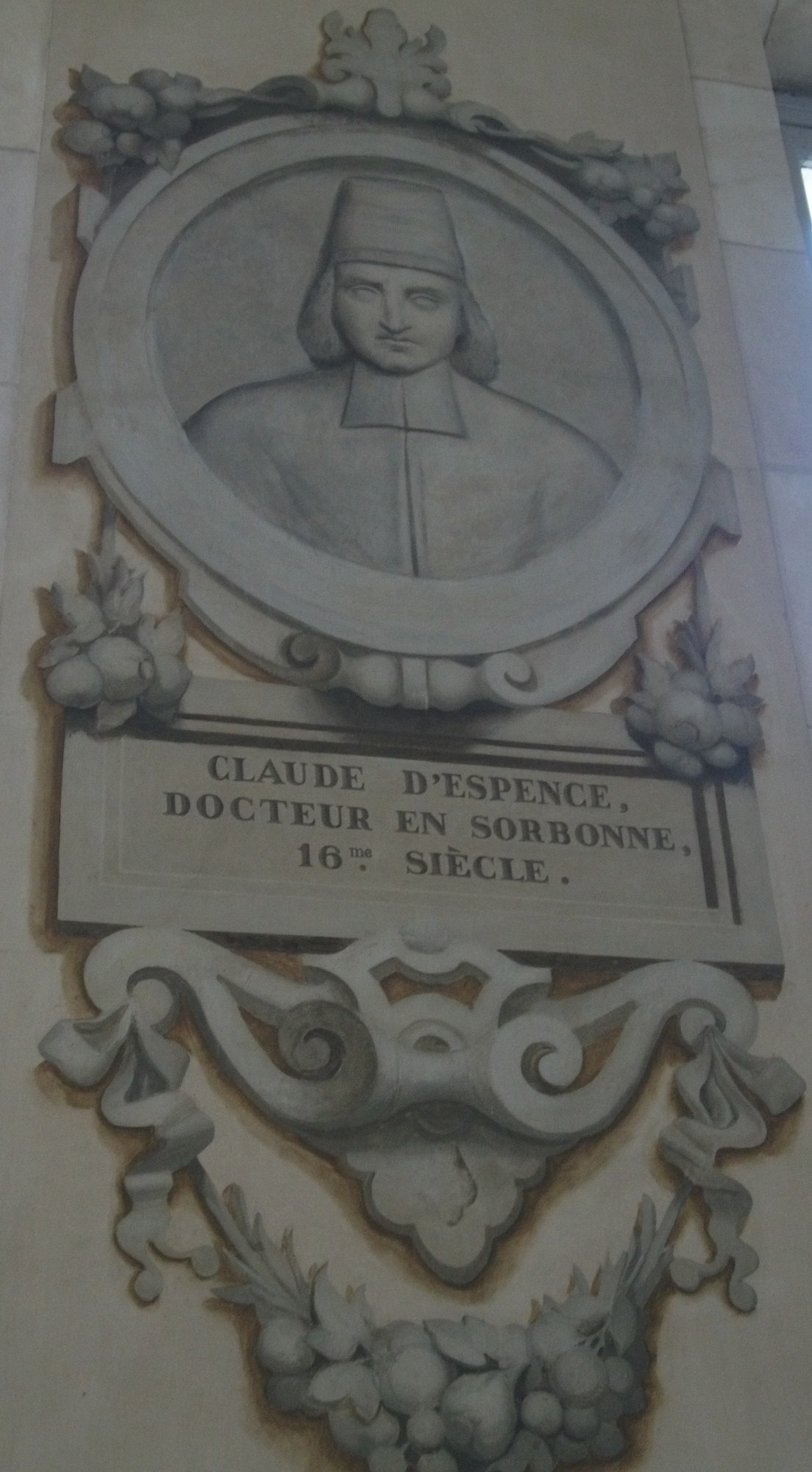 grisaille se trouvant à la mairie de Châlons.